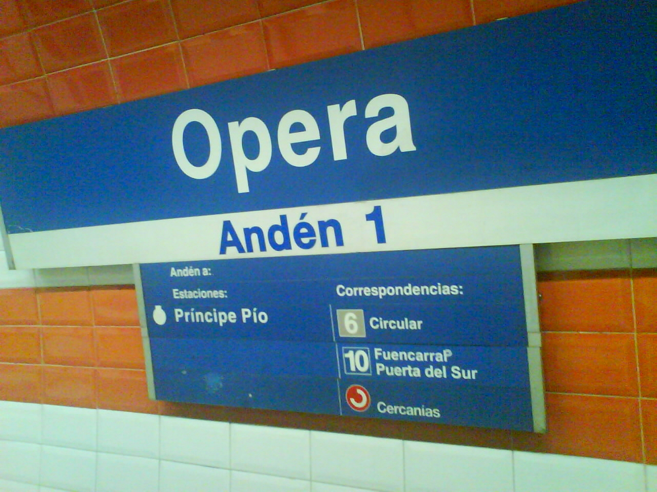 Cartel de la estación de Ópera en el Ramal